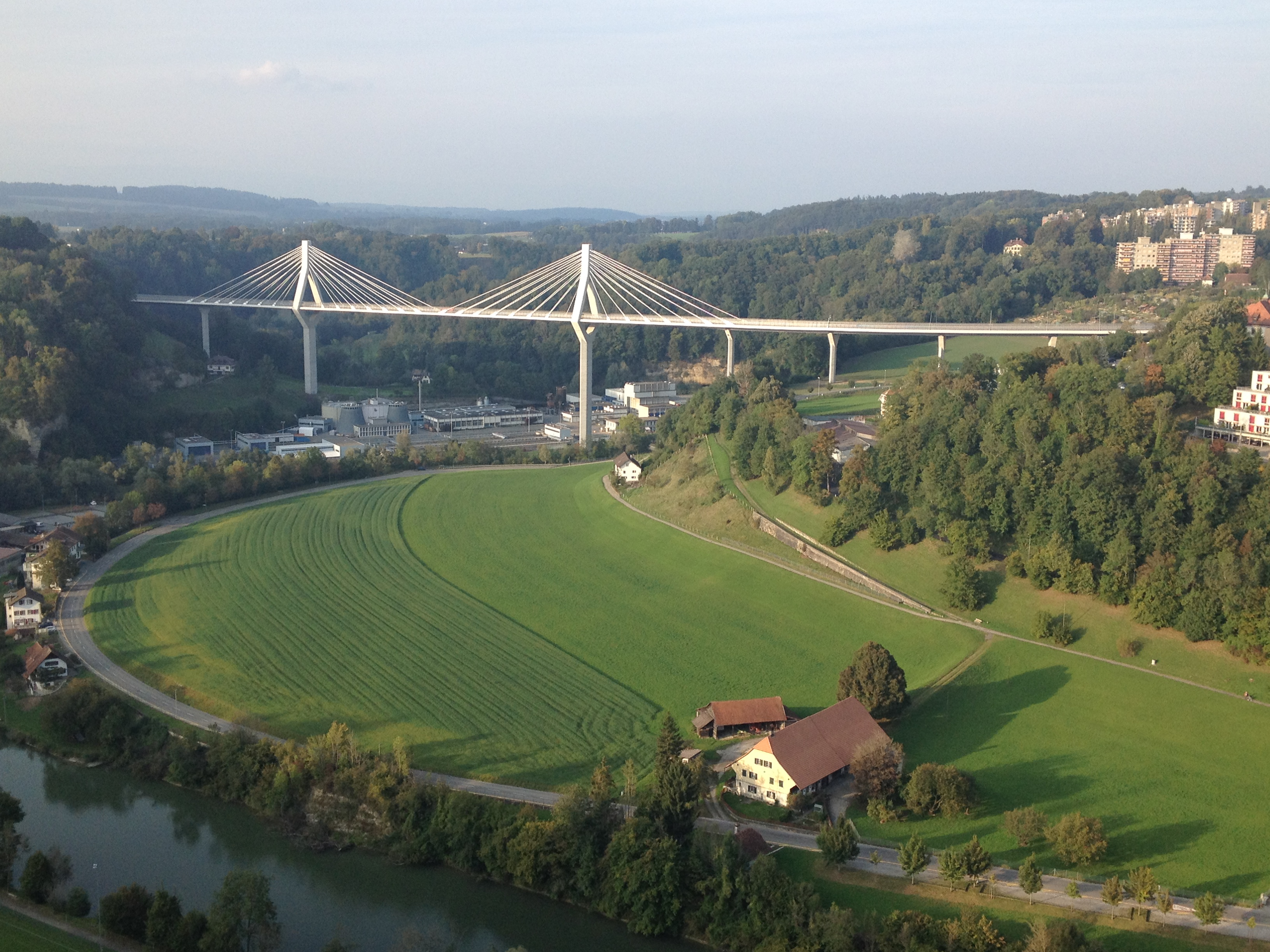 Pont de la Poya achevé, quelques jours avant sa mise en service (sept. 2014)